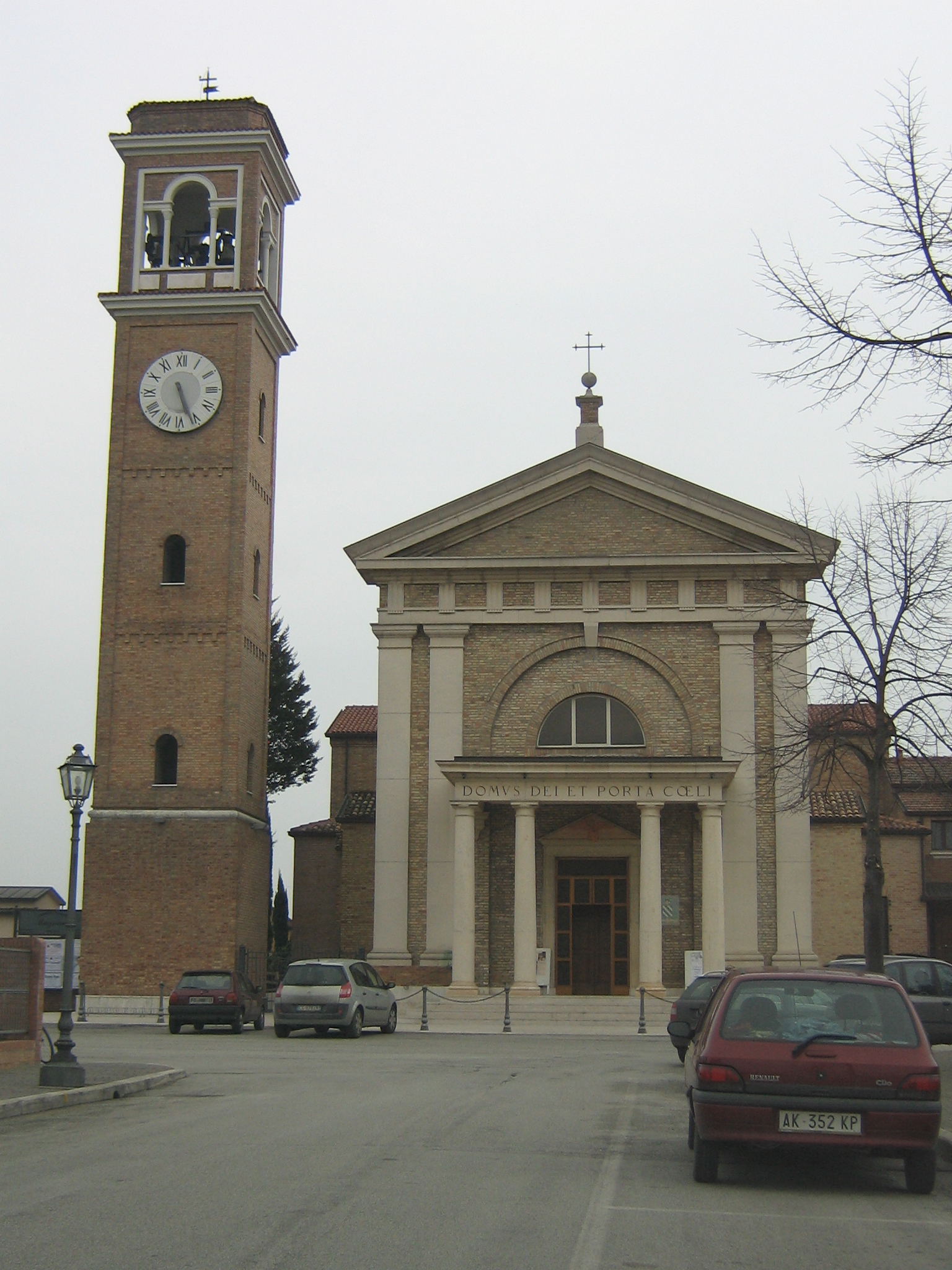 Chiesa di San Michele, Gatteo (FC) loc. Sant'Angelo, Italy